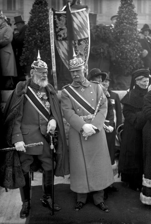 Die feierliche Enthüllung des Kriegerdenkmals in München für die dreizehntausend in der Bayrischen Armee gefallenen Helden, welche unter Beisein hoher Fürstlichkeiten vorgenommen wurde. Kronprinz Ruprecht rechts und Prinz Leopold von Bayern links während der Feier.